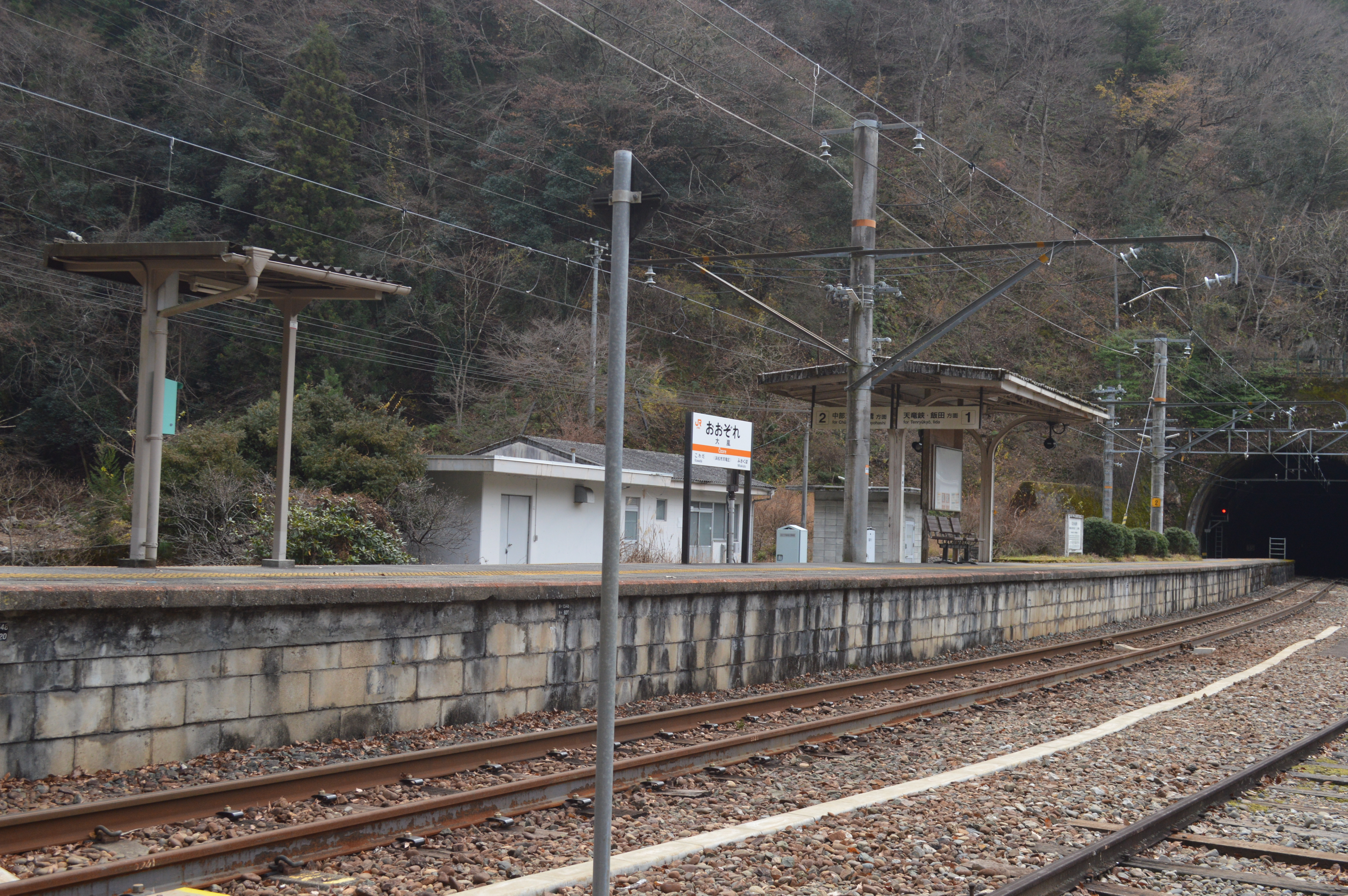 JR飯田線大嵐駅。静岡県浜松市天竜区。